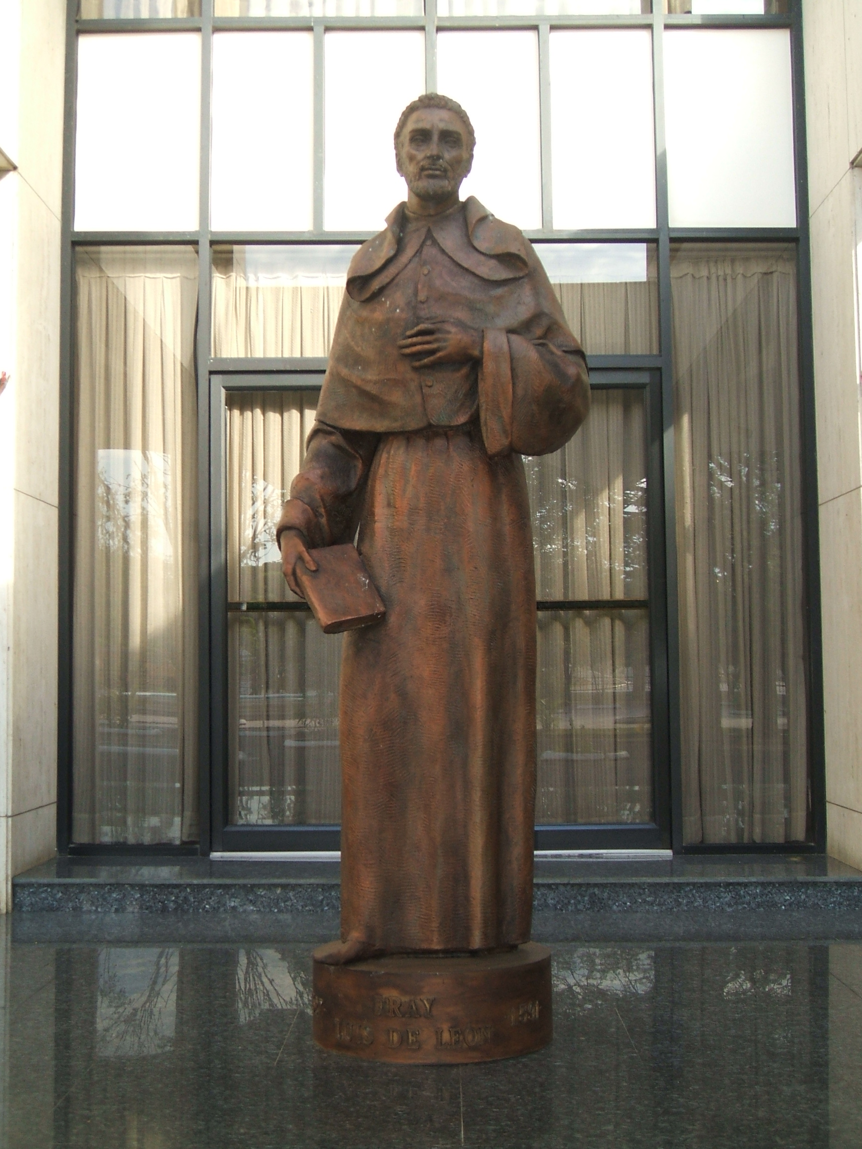 Estatua de Fray Luis de León en la fachada frontal del Gran Teatro del Cibao en Santiago, República Dominicana.